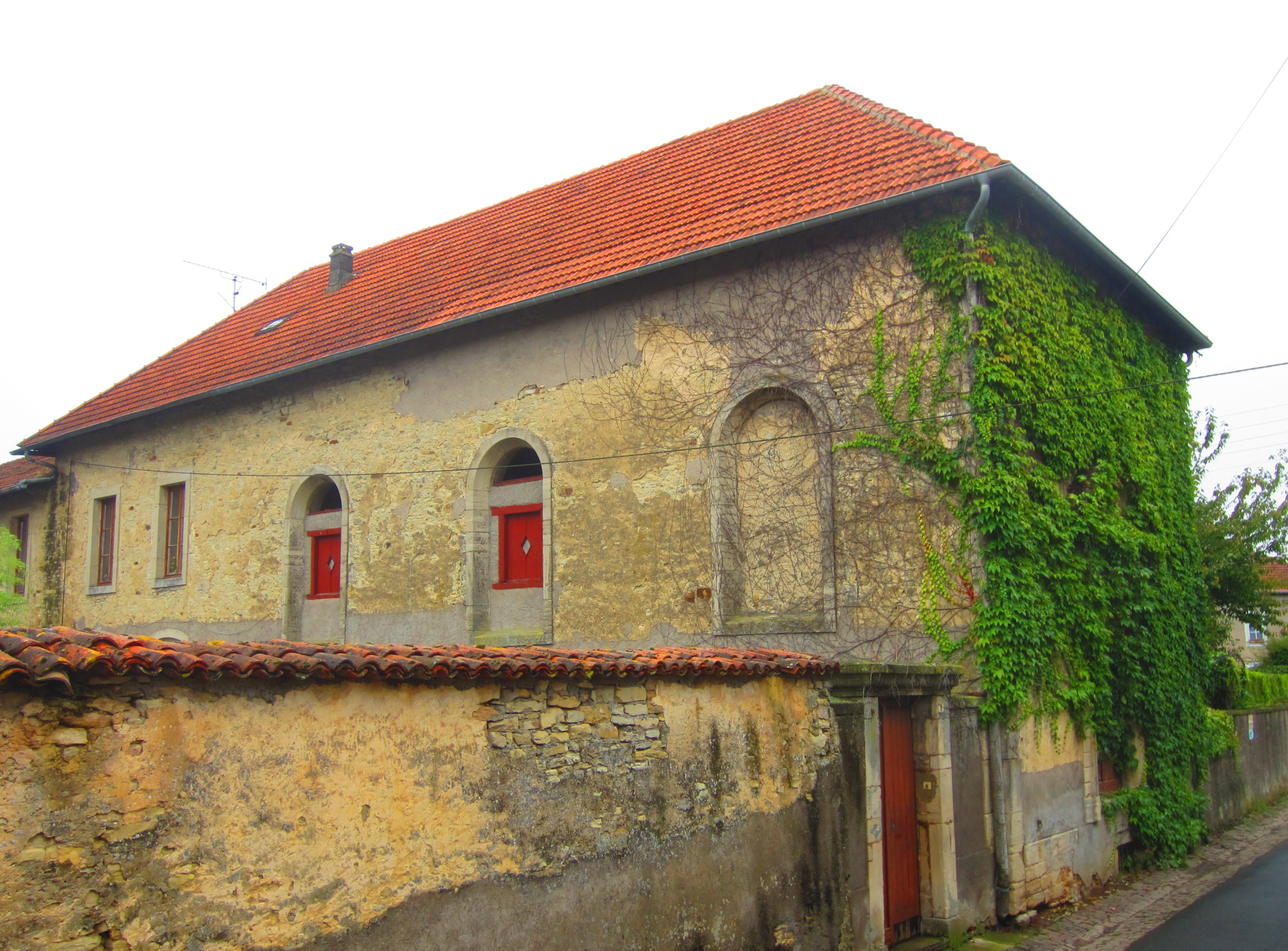 Eglise capucins Marsal